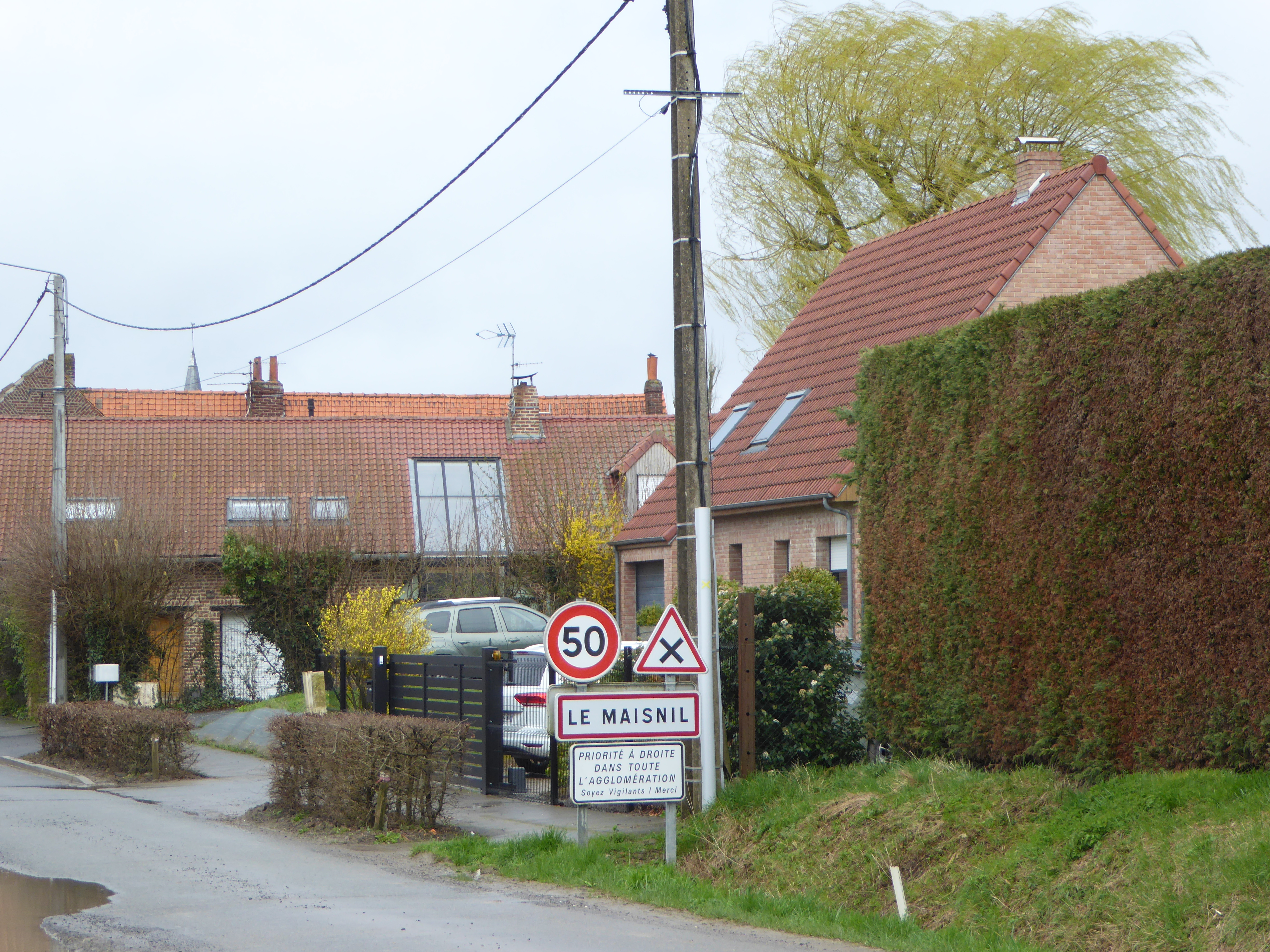 City limit Le Maisnil, France